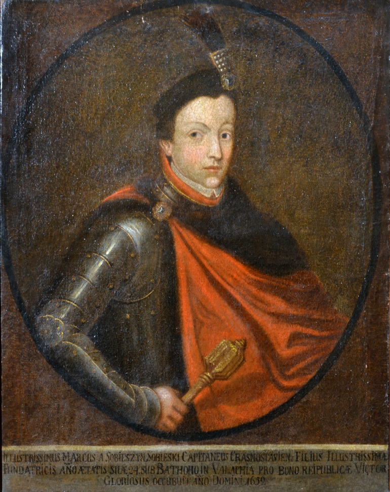 Marek Sobieski (1628-1652)